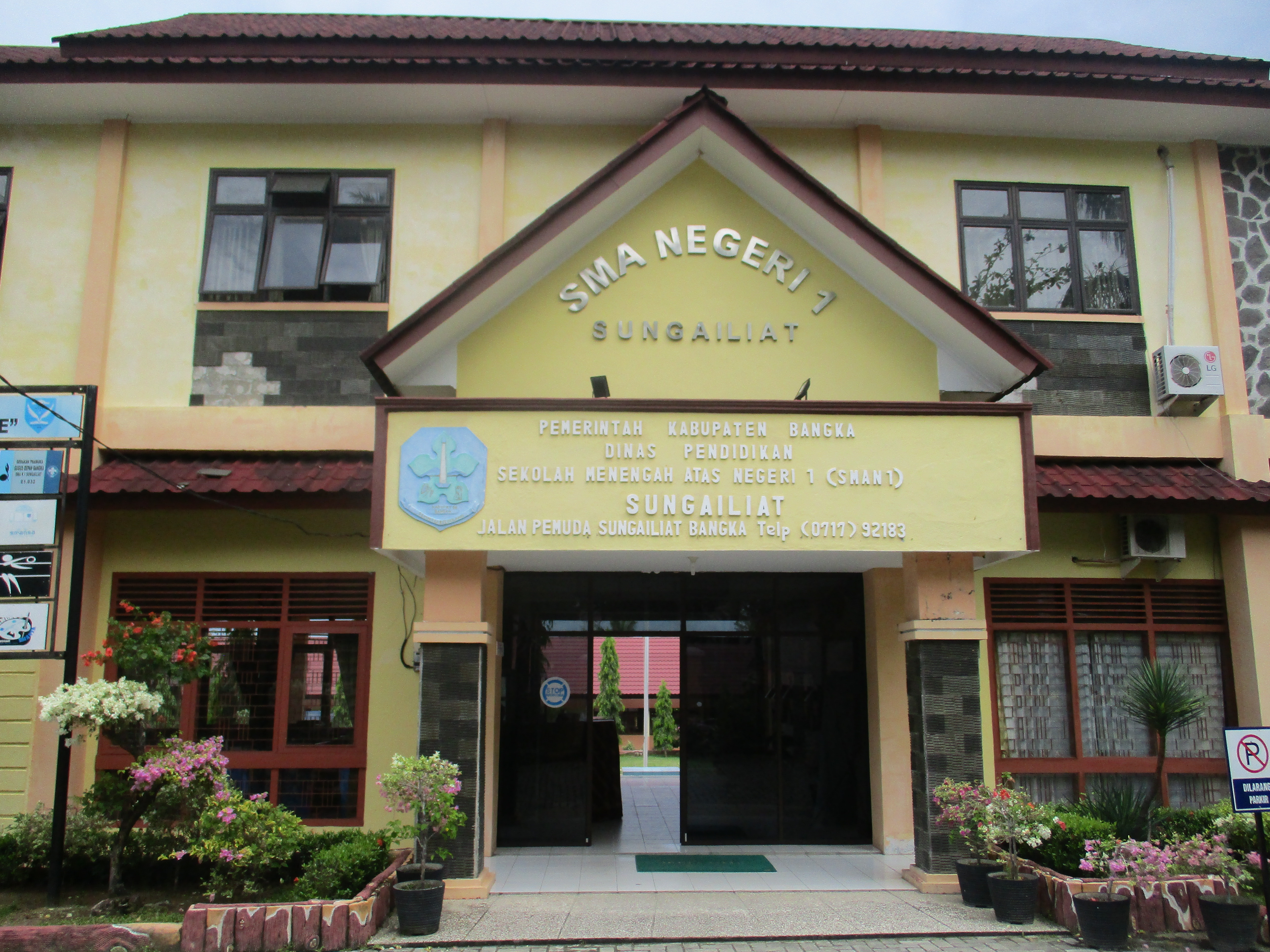 邦加勿里洞省烈港市第一國立高中學校 / SMA Negeri 1 Sungailiat, Bangka Belitung